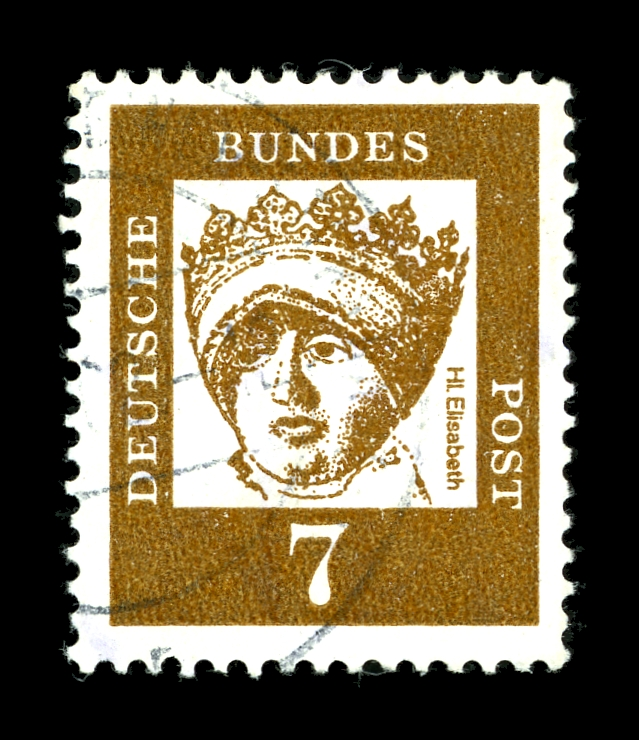 Elisabeth von Thüringen (Serie Bedeutende Deutsche)